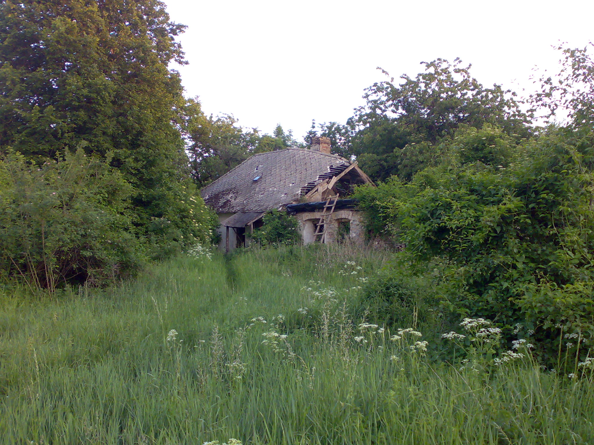 Vámostanya